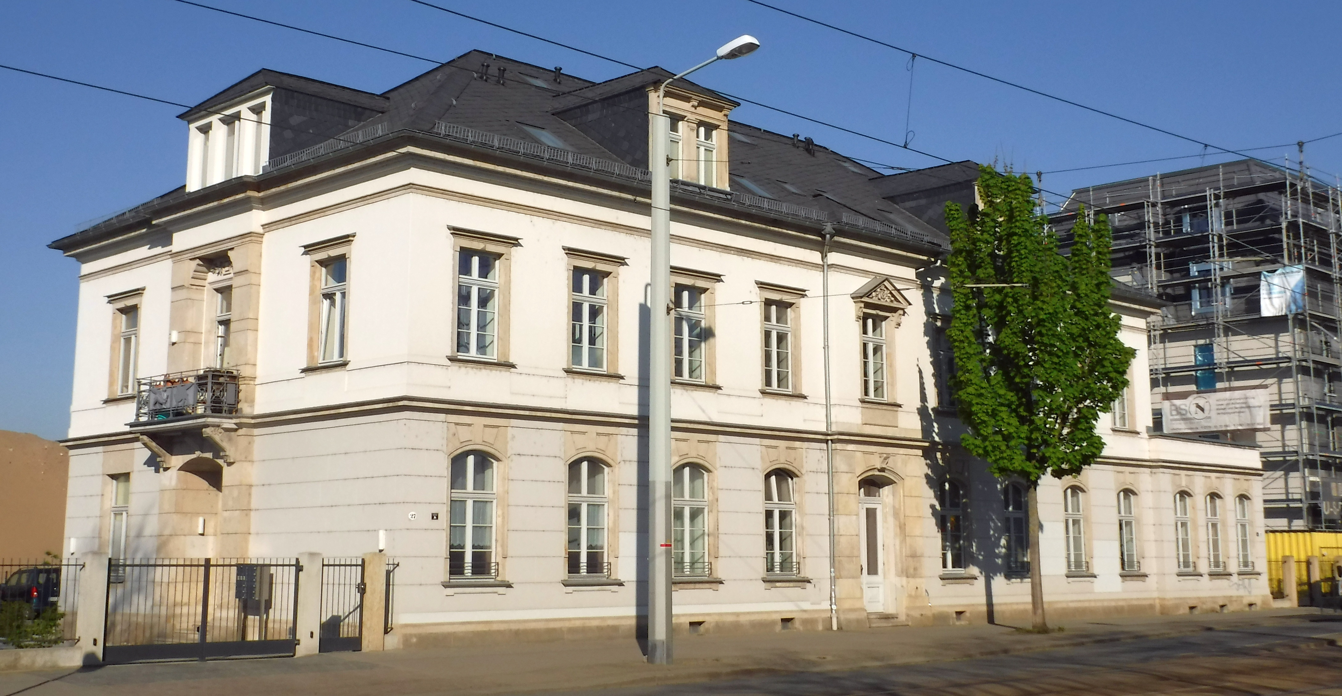 Die Villa Leipziger Straße 27 in Dresden